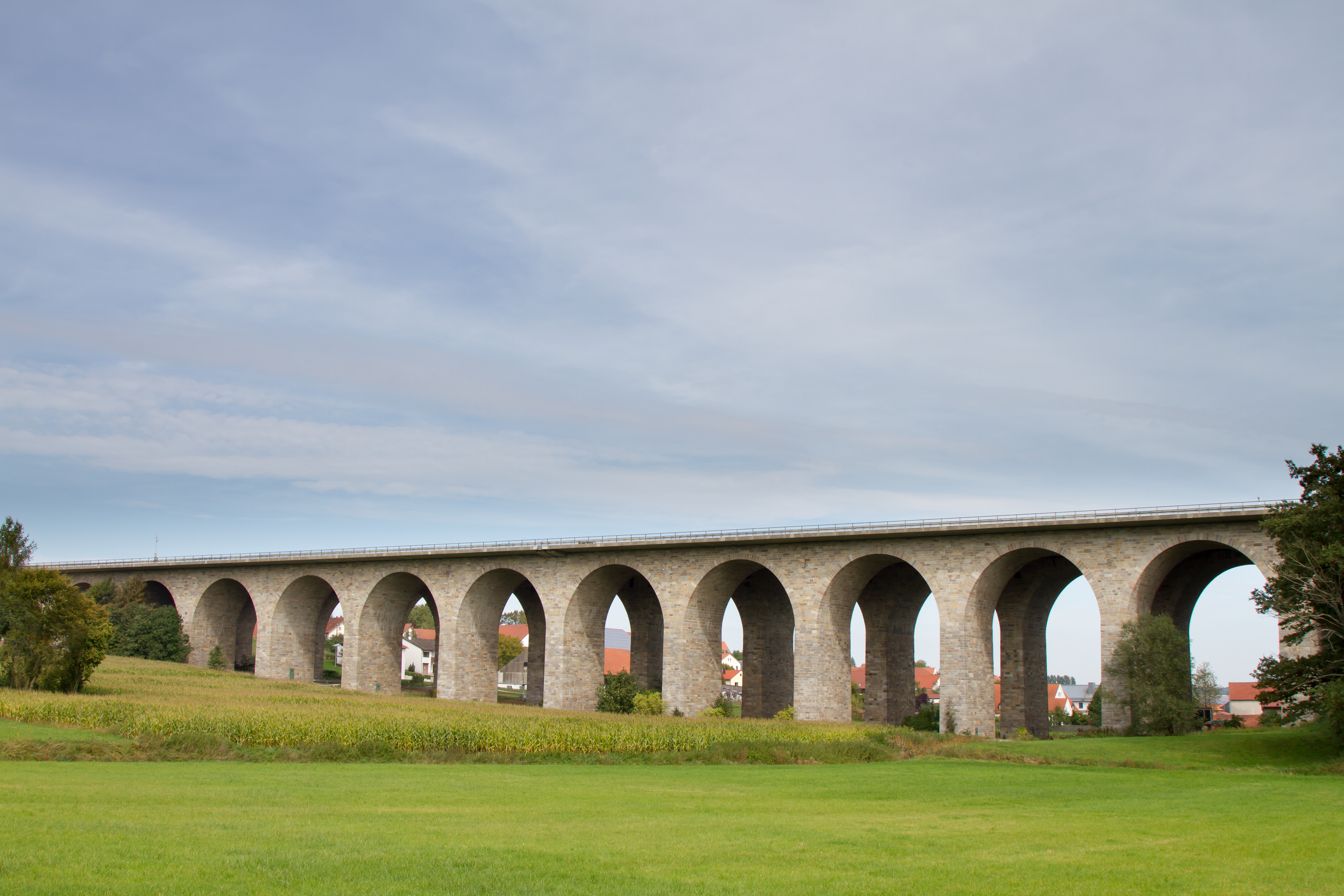 Autobahnbrücke Holledau, Viadukt der 1936 begonnenen Reichsautobahn, 16-bogiger, als Doppelbrücke errichteter Betonbau, Bogenreihen mit verschiedenfarbigen Granitplatten verblendet, durch Fahrbahnüberbau nachträglich zusammengeschlossen, von Georg Gsaenger, 1937-39, 1945 gesprengt, 1949 wieder aufgebaut.This is a photograph of an architectural monument.